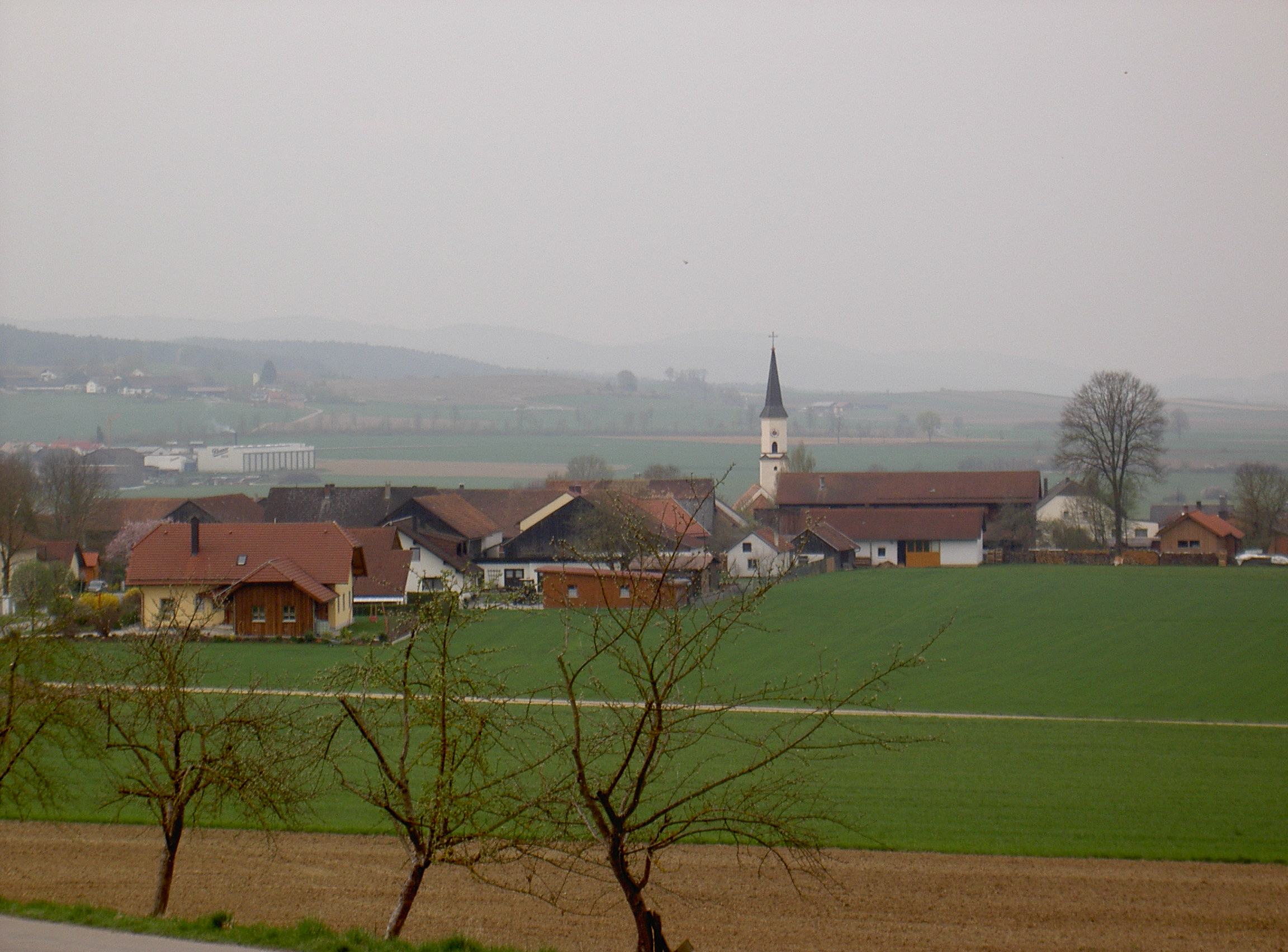 Döfering